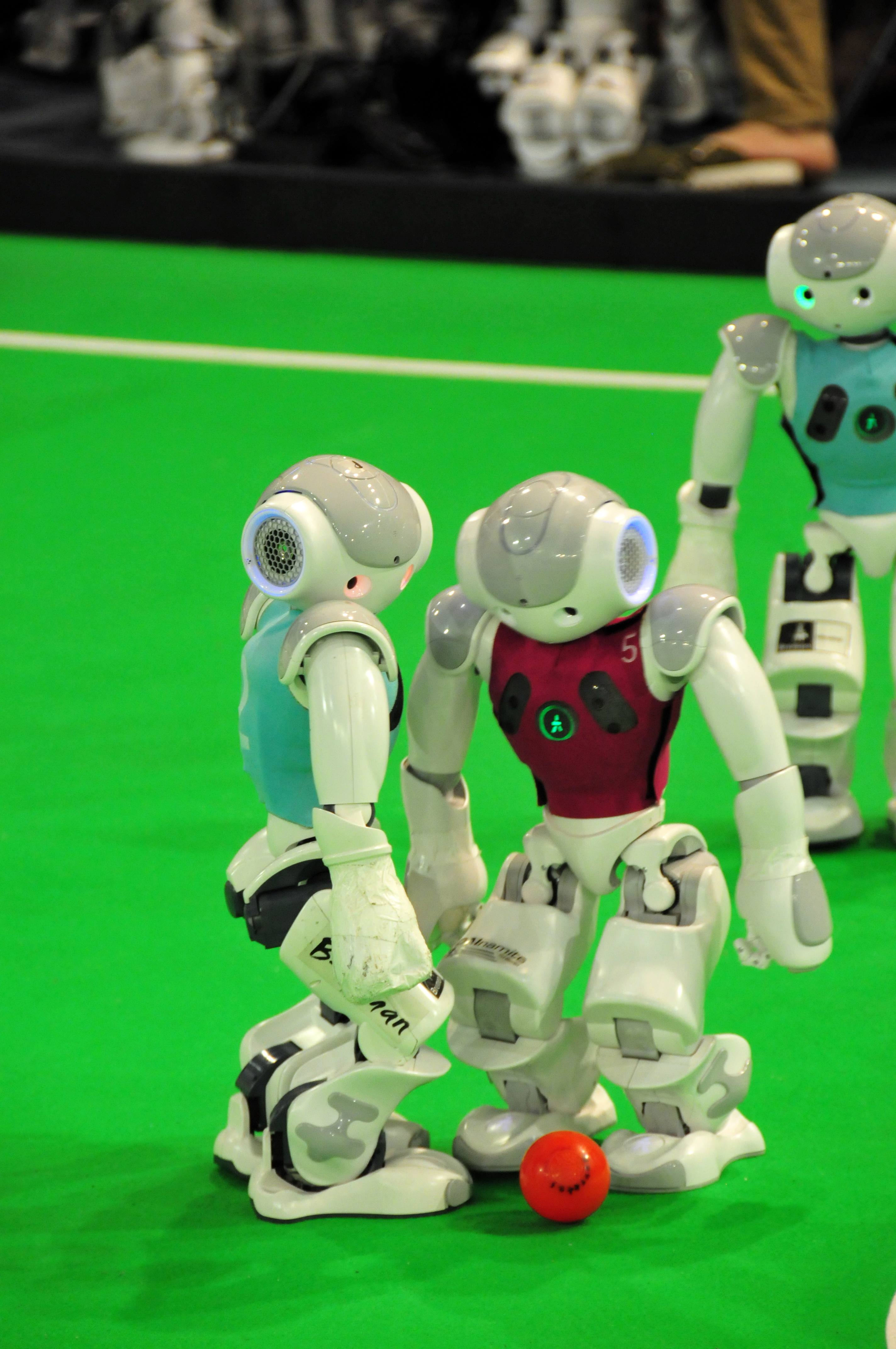 Eindhoven, Niederlande, Robocup 2013